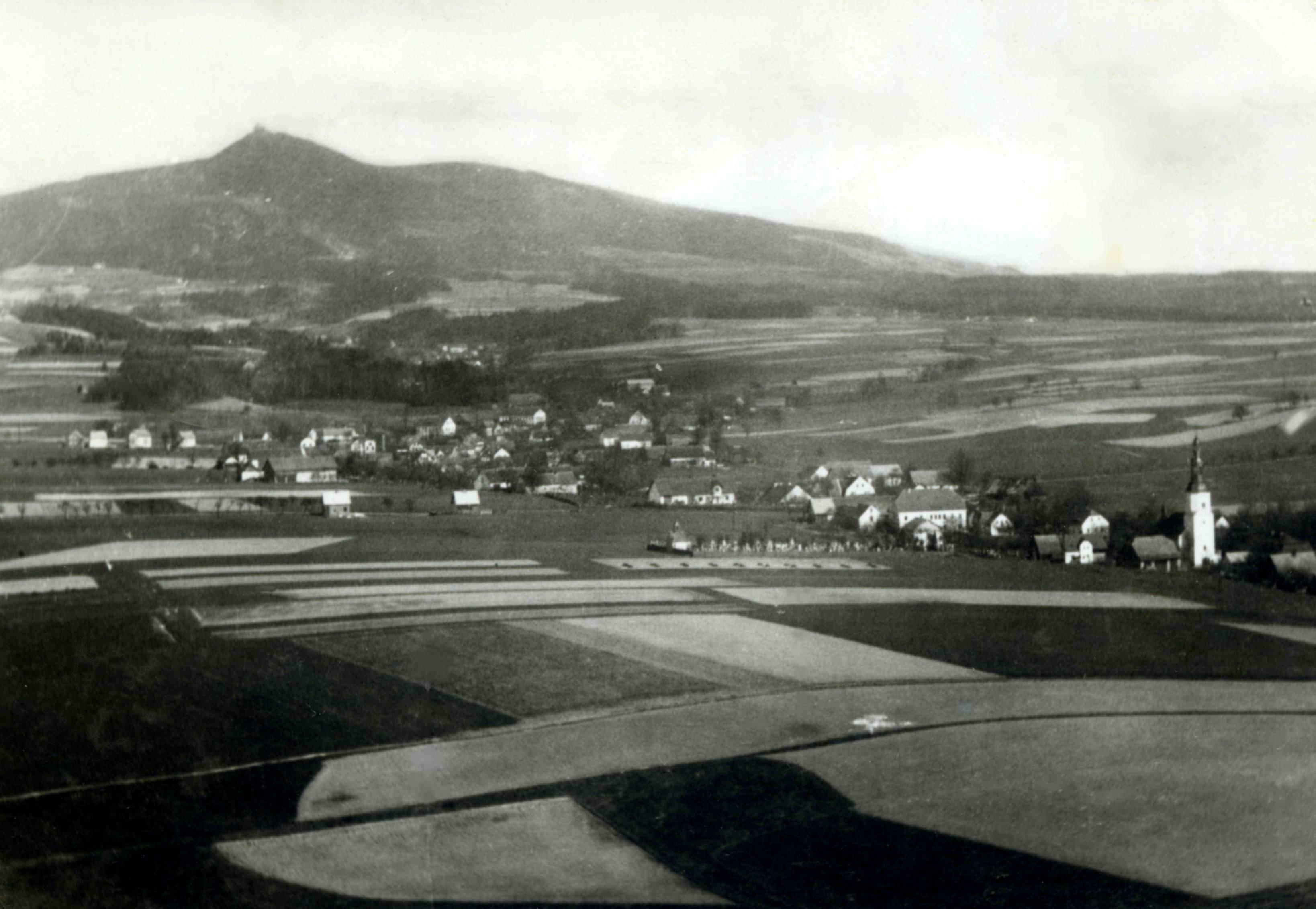 Křižany